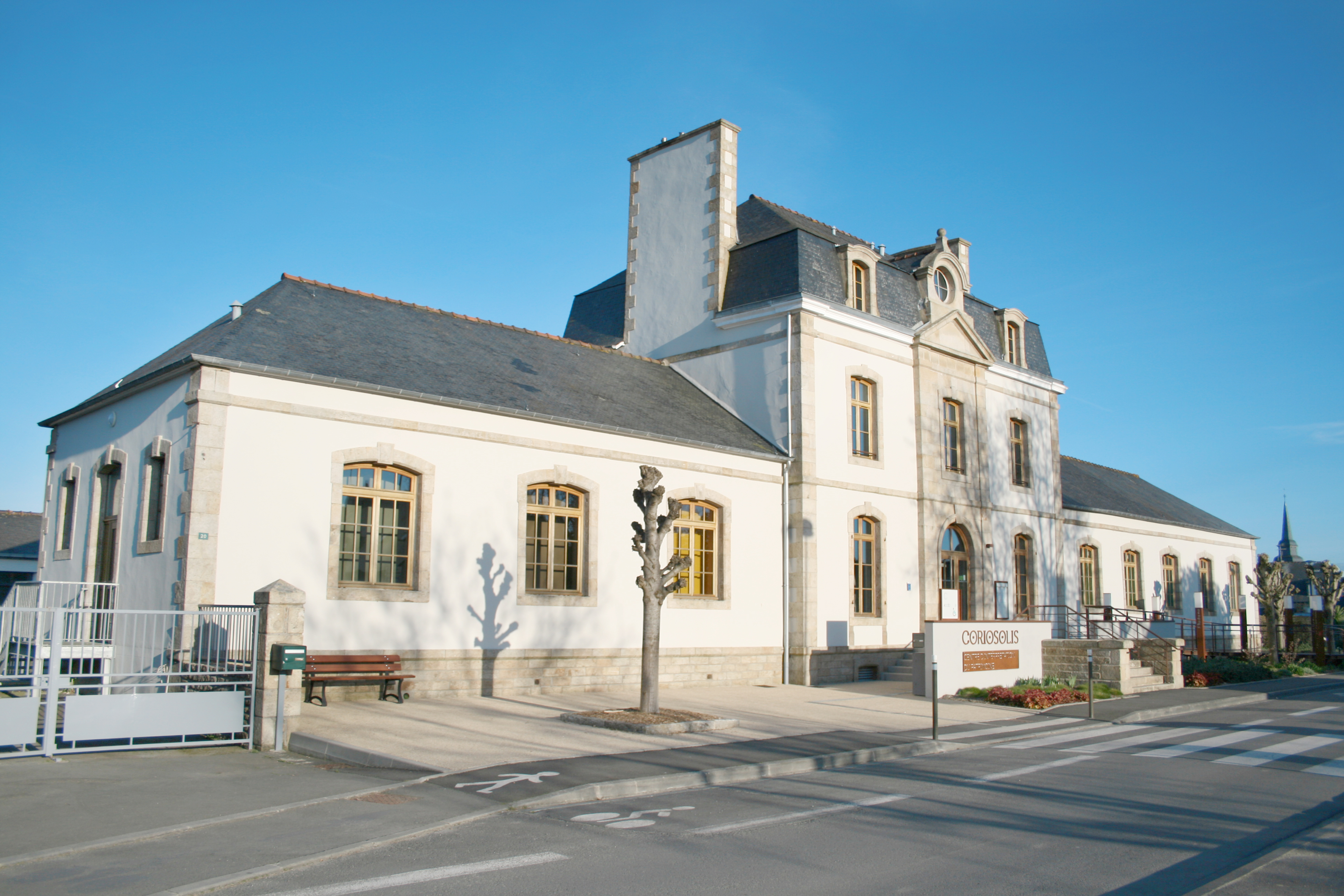 Coriosolis, le Centre d'Interprétation du Patrimoine de la Communauté de Communes, à Corseul (22), est ouvert depuis janvier 2014. Il est situé dans l’ancienne école publique construite au XIXe siècle, rue César Mulon.